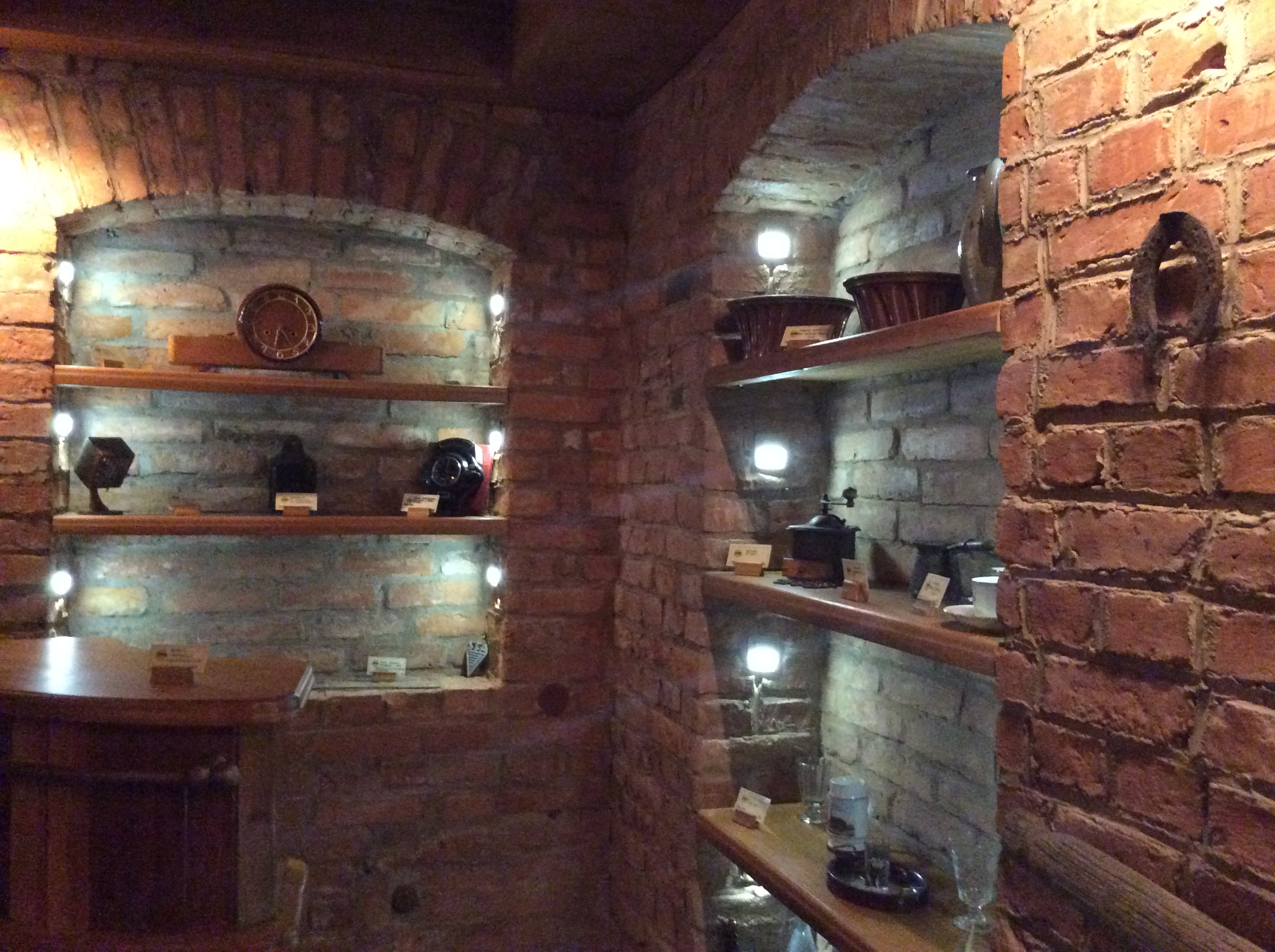 Muzeum komunikacji miejskiej w Toruniu